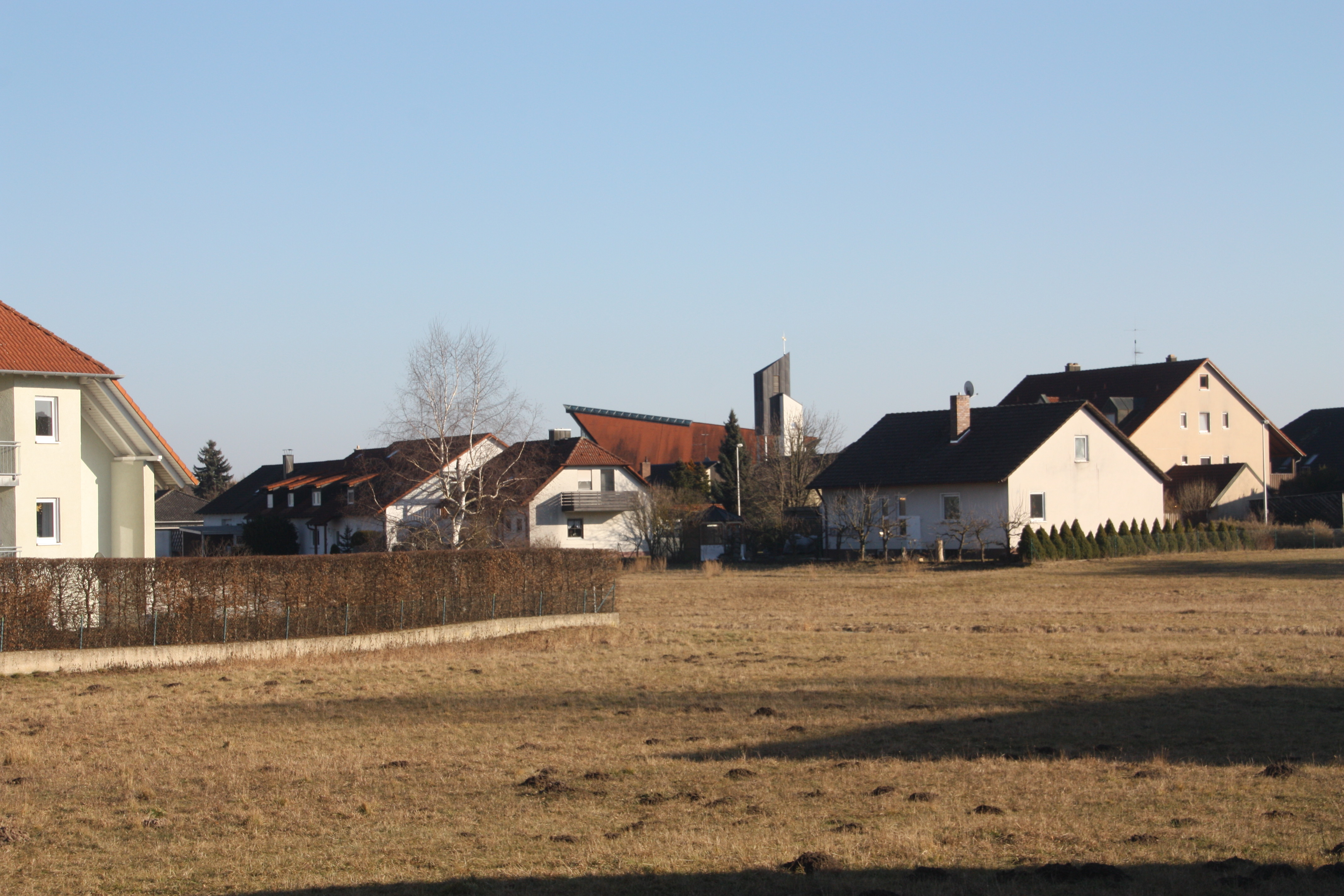 Großenseebach